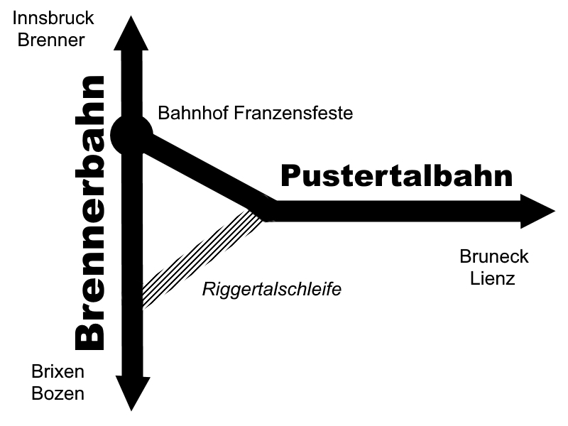 Schematische Grafik zur projektierten Riggertalschleife